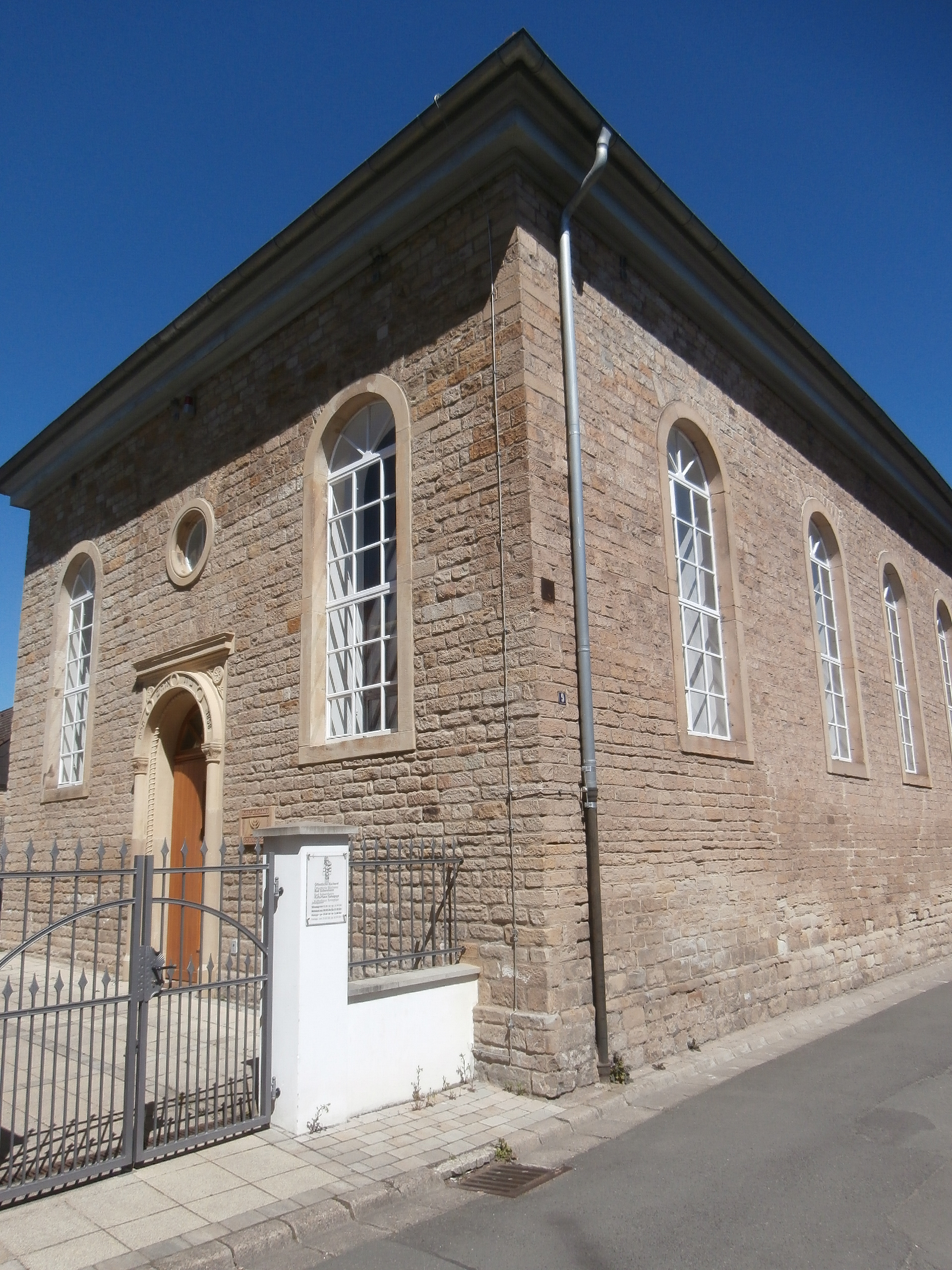 ehemalige Synagoge; spätklassizistischer Walmdachbau, Sandsteinquader, bezeichnet 1859